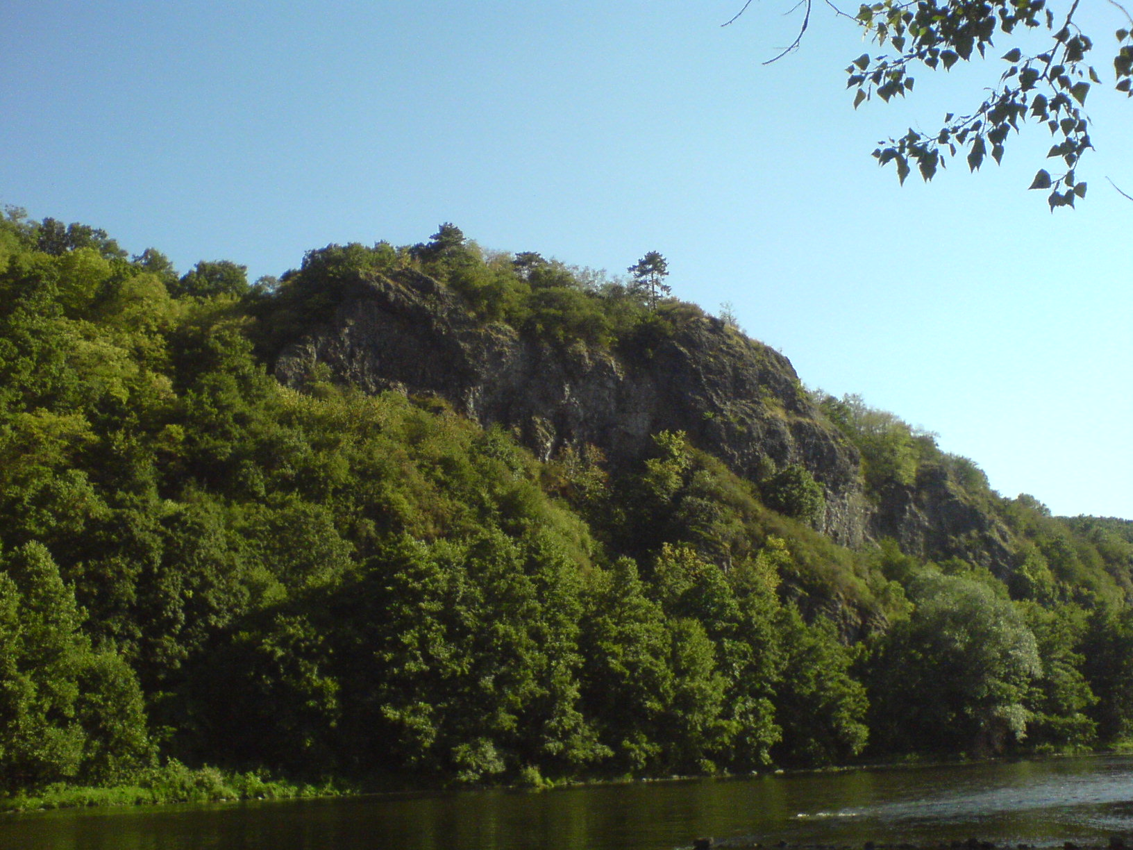 Veľký Krivín